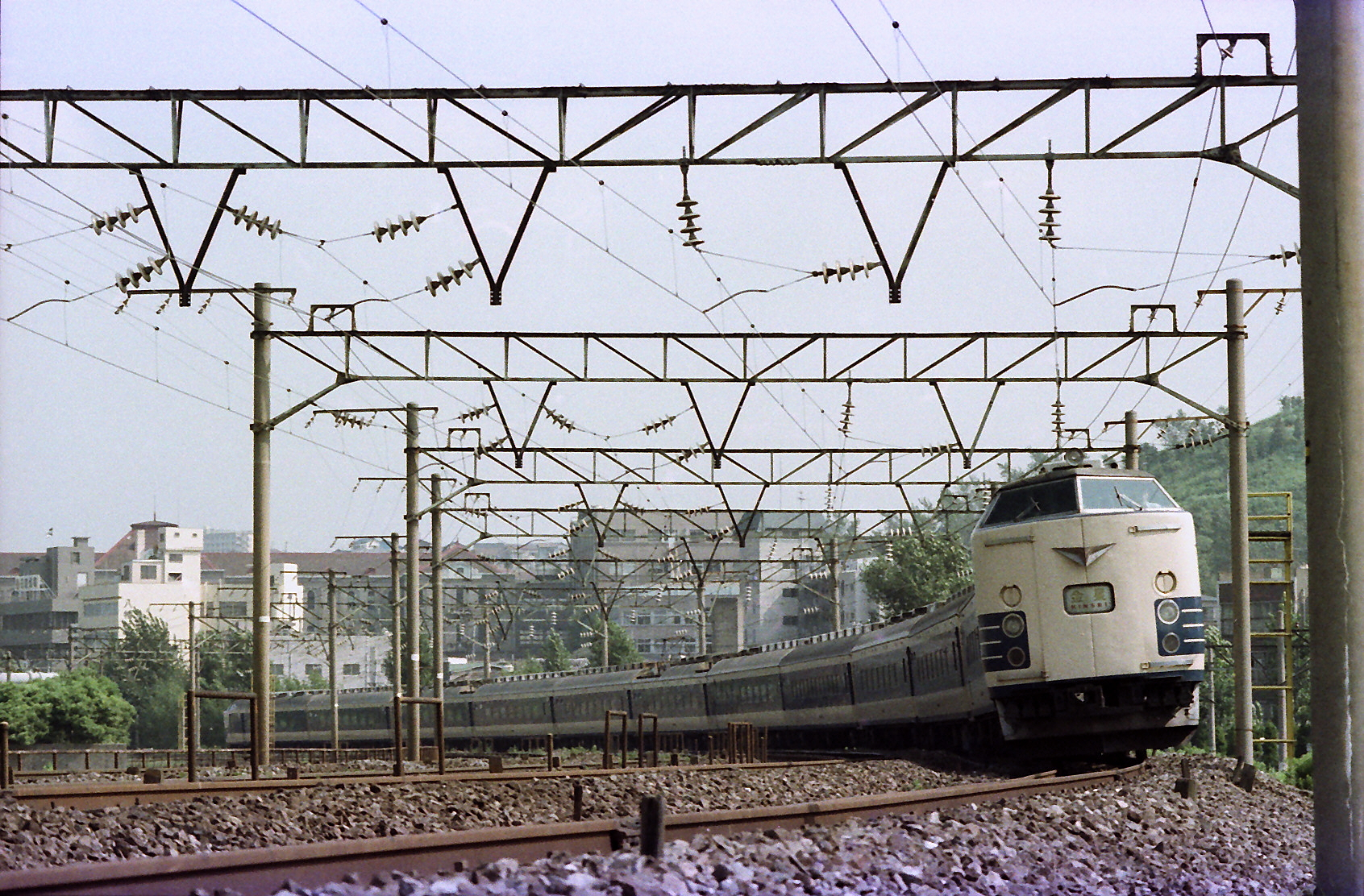 寝台特急「金星」 名古屋22：50-博多10：11 博多18：47-名古屋6：10 鹿児島本線 枝光駅-八幡駅（旧線） 枝光カーブ